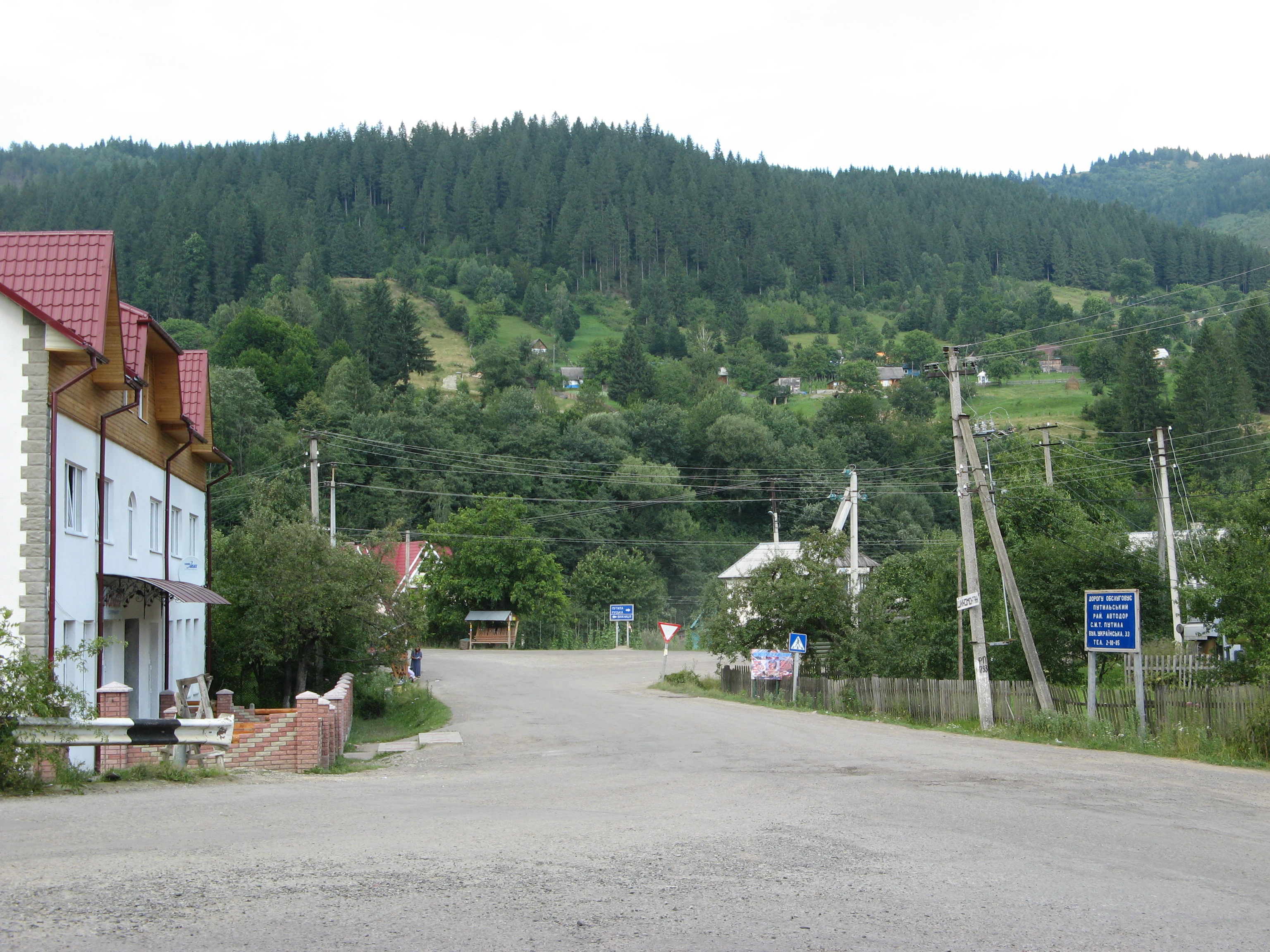 с. Усть-Путила (Путильський р-н)